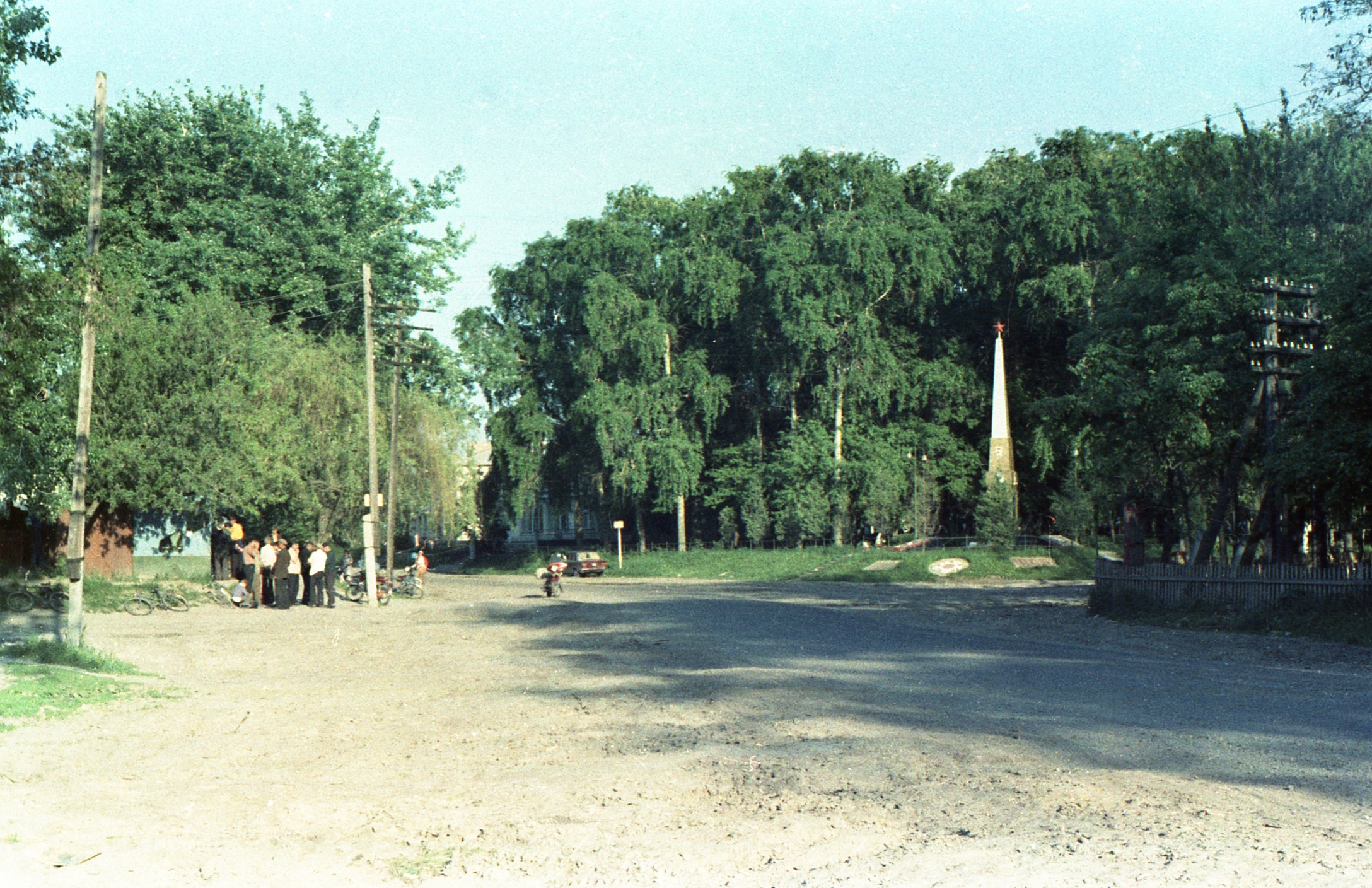 Центр Марківців, 1970-і.